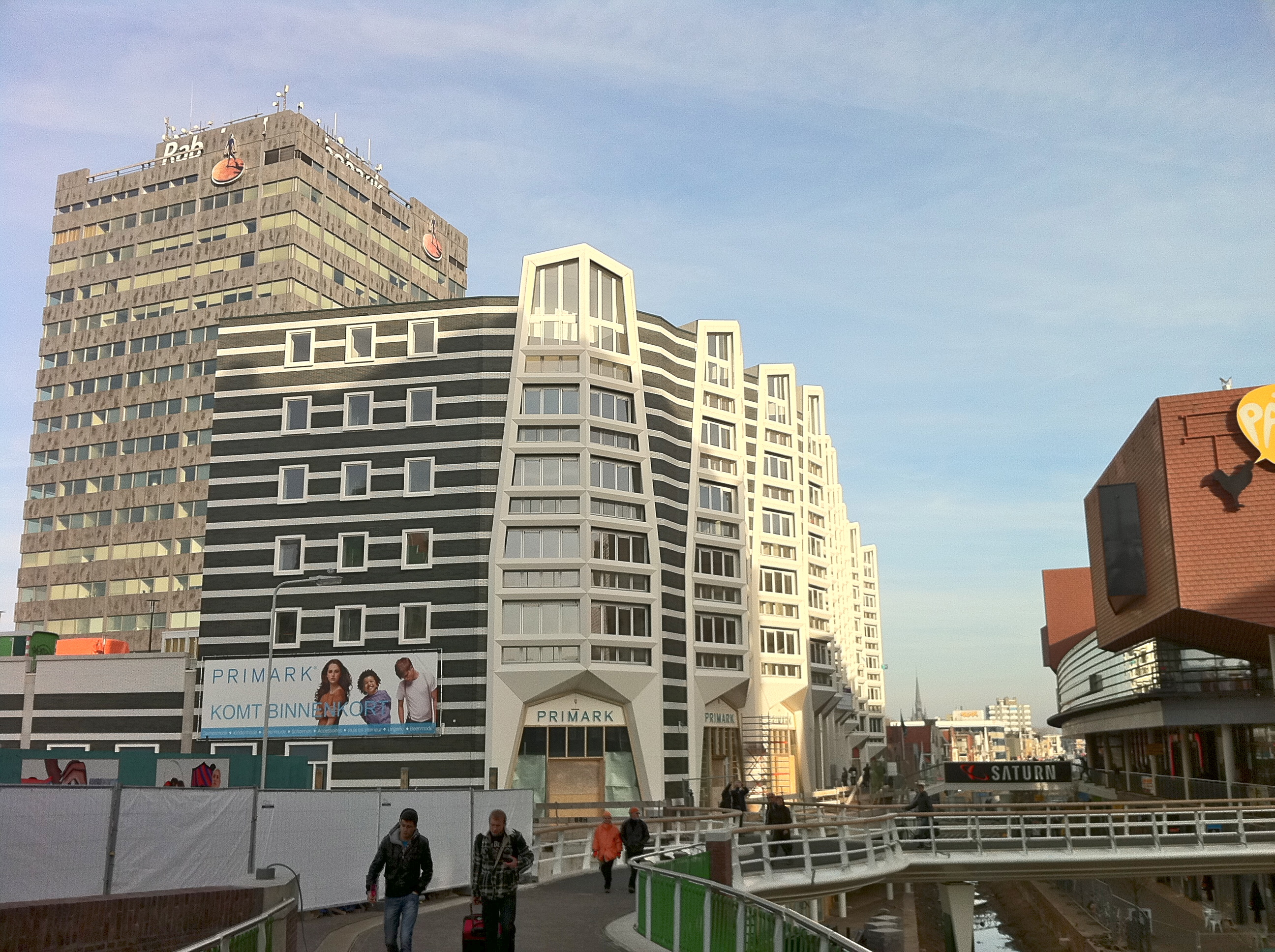 Zaandam - Zaanse Gracht. Koop- en huurappartementen in Plan Inverdan